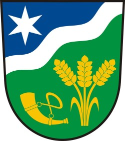 Lukavice